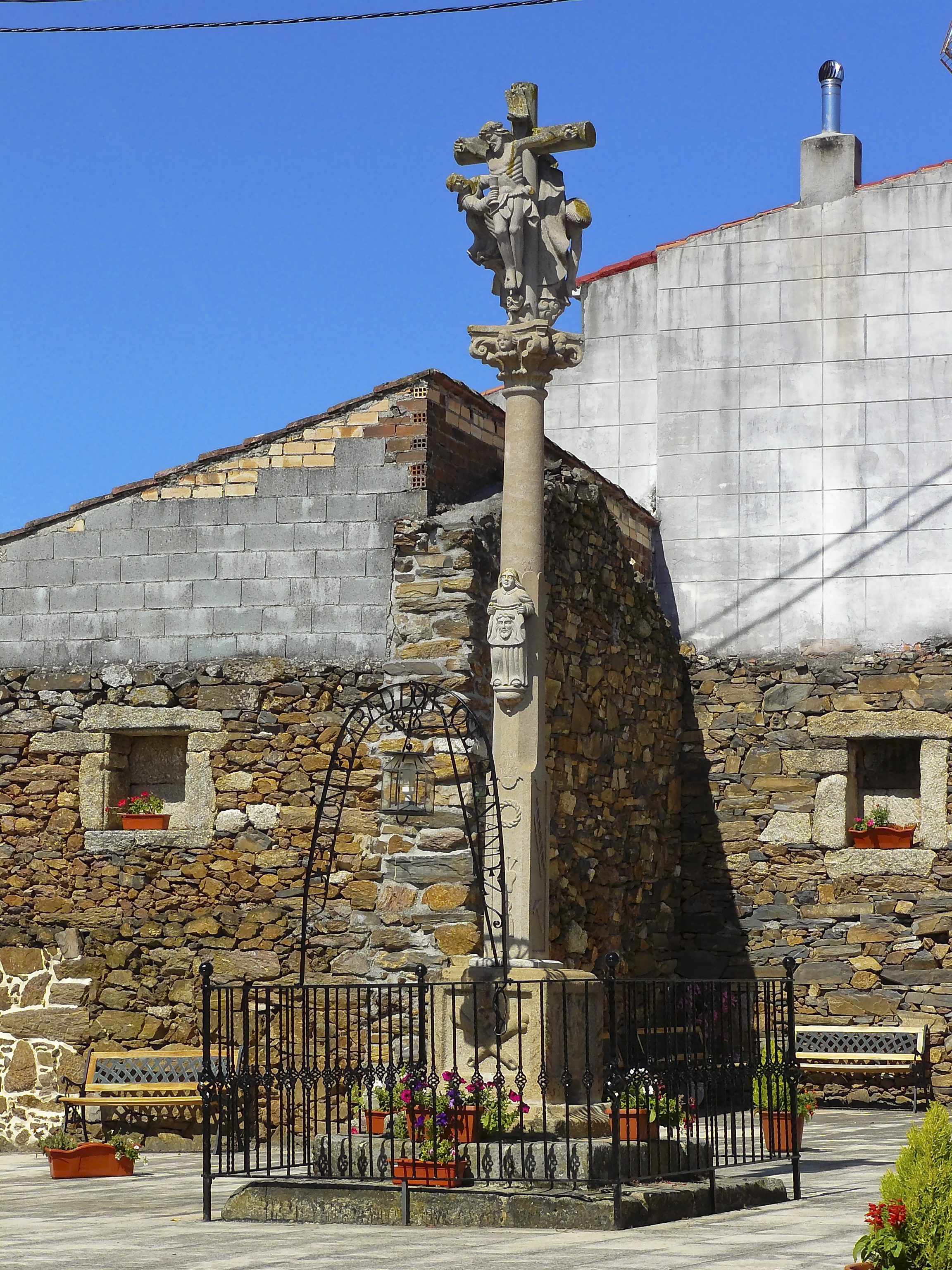 Cruceiro de animas de Cenlle